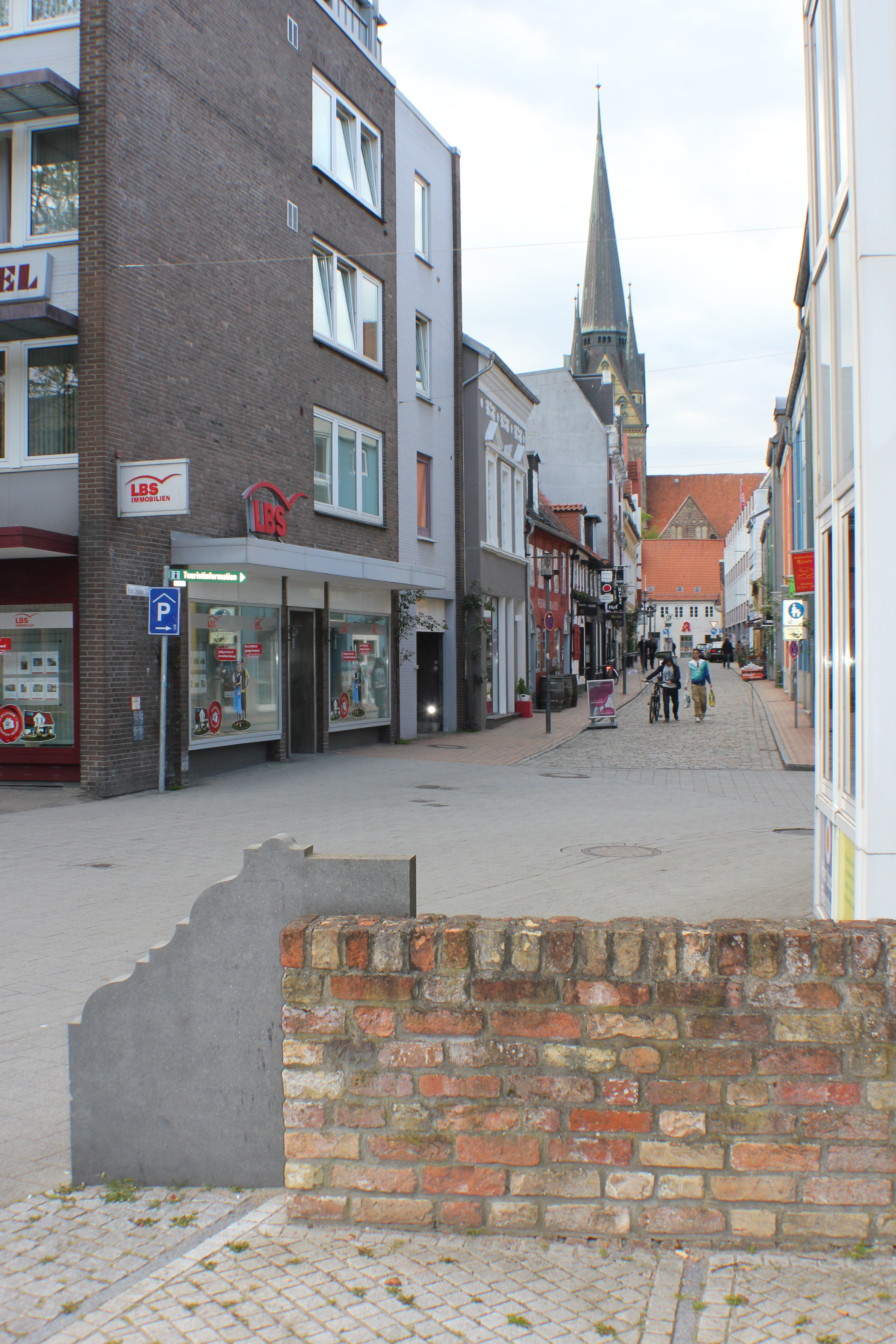 Ungefährer Standort vom Roten Tor (Flensburg), Bild 02